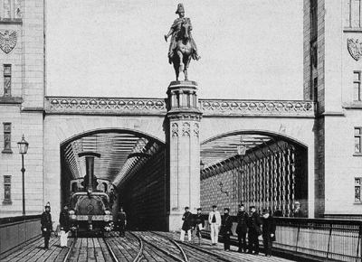 Portal der Dombrücke mit Lok der Köln-Mindener Eisenbahn. Reiterstandbild Friedrich Wilhelm IV von Gustav Blaeser.